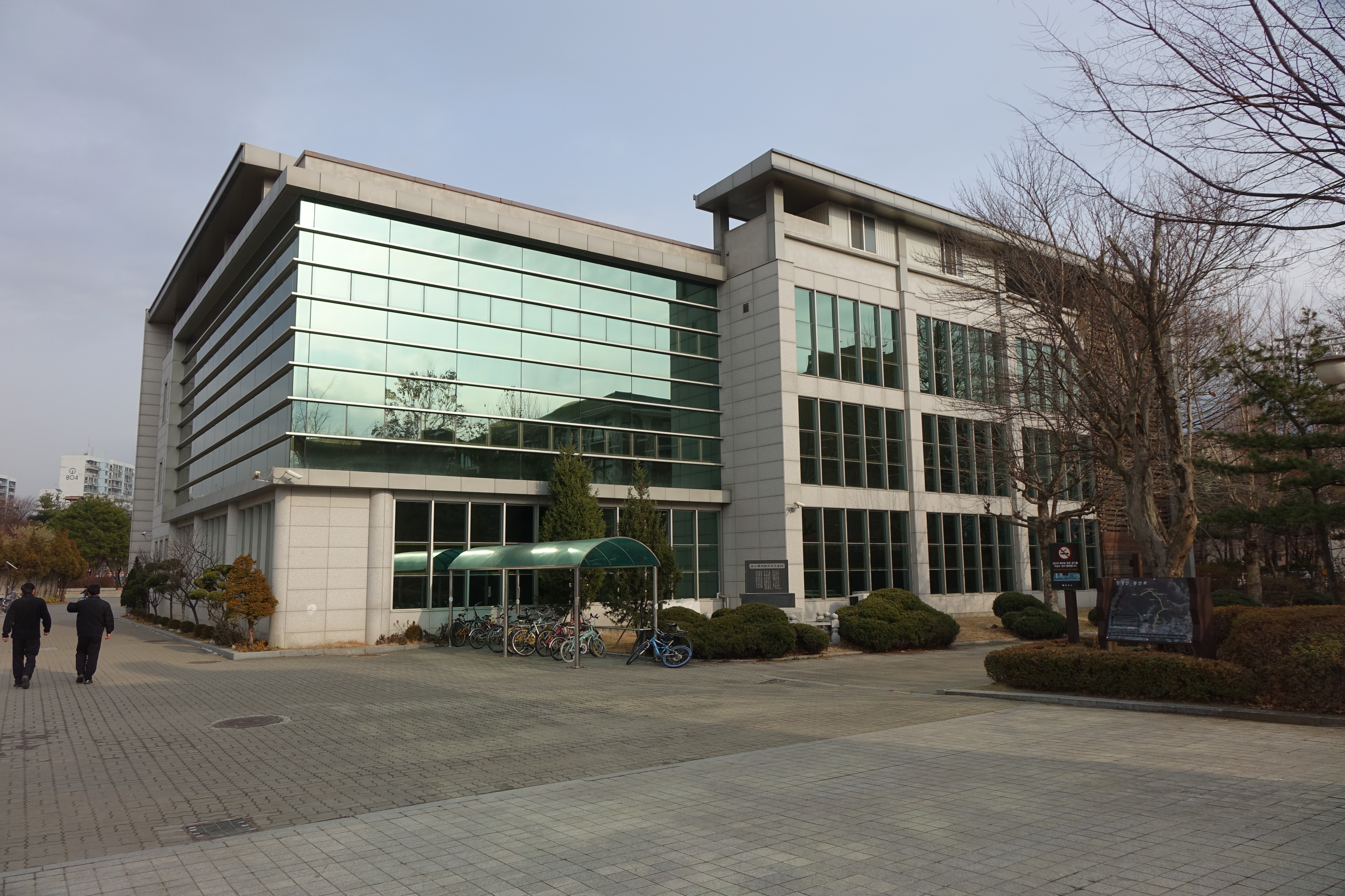 2014년 12월 20일 경 촬영